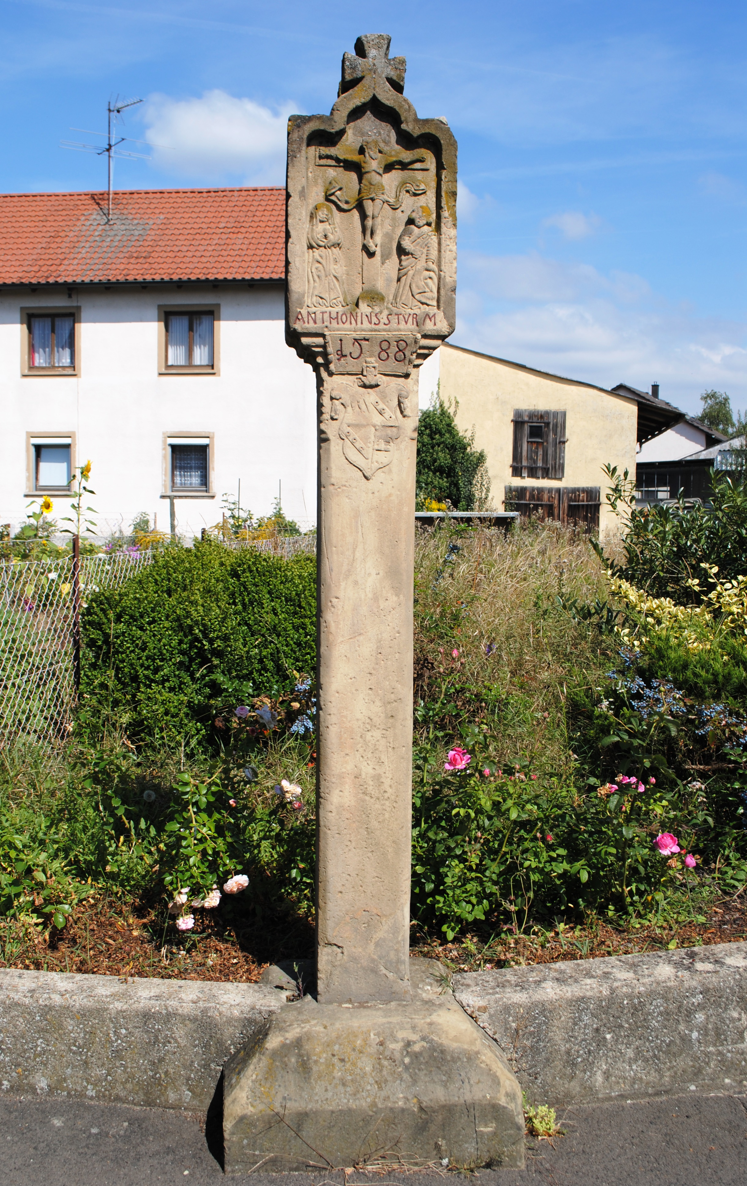 Bildstock, Volkacher Straße, SommerachThis is a photograph of an architectural monument.